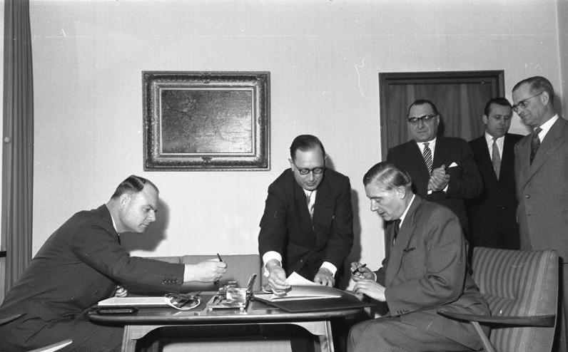 Deutsch-Neuseeländisches Handelsabkommen im Auswärtigen Amt